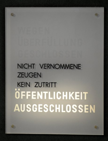 Schild nichtöffentliche Verhandlung